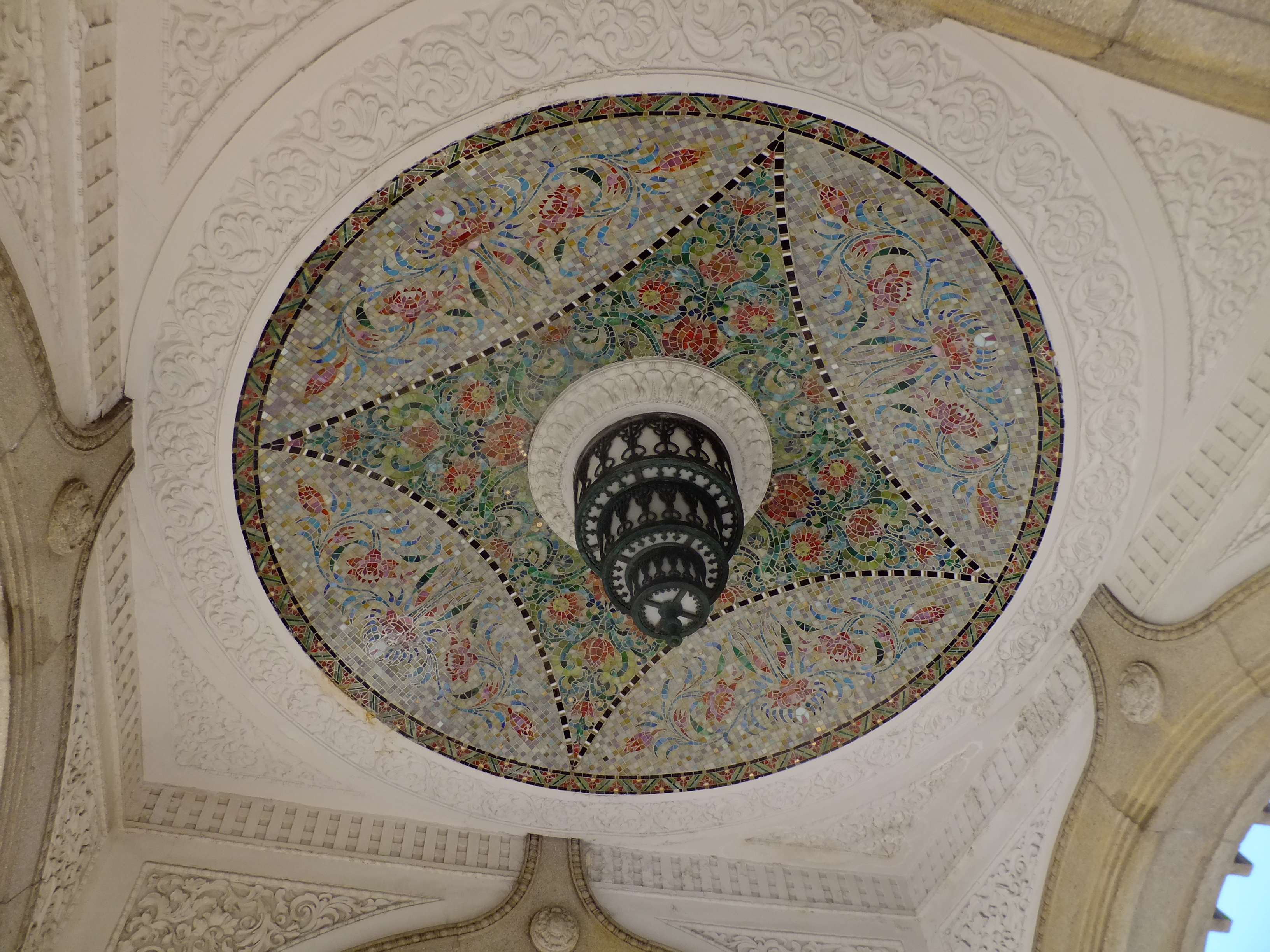 装飾が施されたインド水塔の天井